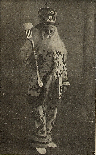 Maschera tipica del carnevale veronese: il Papà del Gnoco. Fotografia dei primi anni del XX secolo. Viene rappresentato come un uomo anziano, rubicondo e con una lunga barba bianca, vestito di broccato nocciola e mantello, con una tuba rossa a cui sono attaccati dei sonagli. Viene considerata la più antica maschera d'Italia e d'Europa di cui si abbiano dei documenti certi.